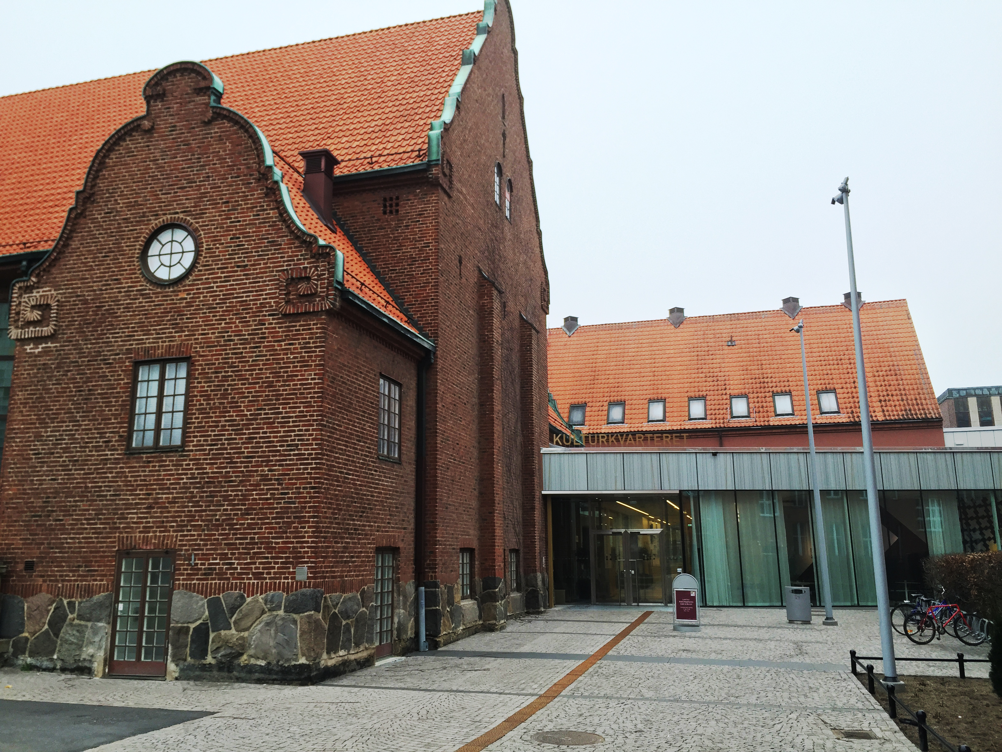 Kulturkvarteret Kristianstad 2015